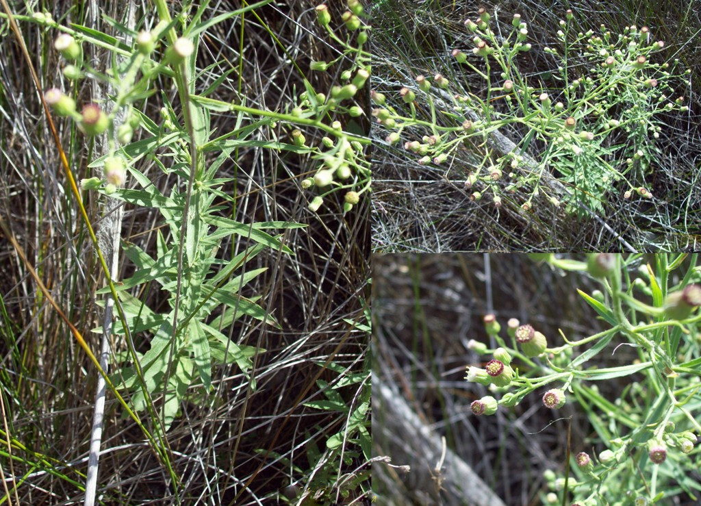 Conyza glandulitecta. Asteraceae. Fotos tomadas sobre suelo arenoso húmedo al margen del Arroyo Carrasco en el departamento de Canelones, Uruguay.